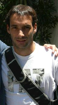 Sebastian Miranda, Universidad Catolica